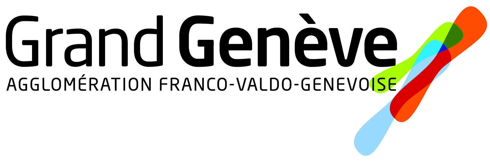 Logo du Grand Genève, Agglomération franco-valdo-genevoise